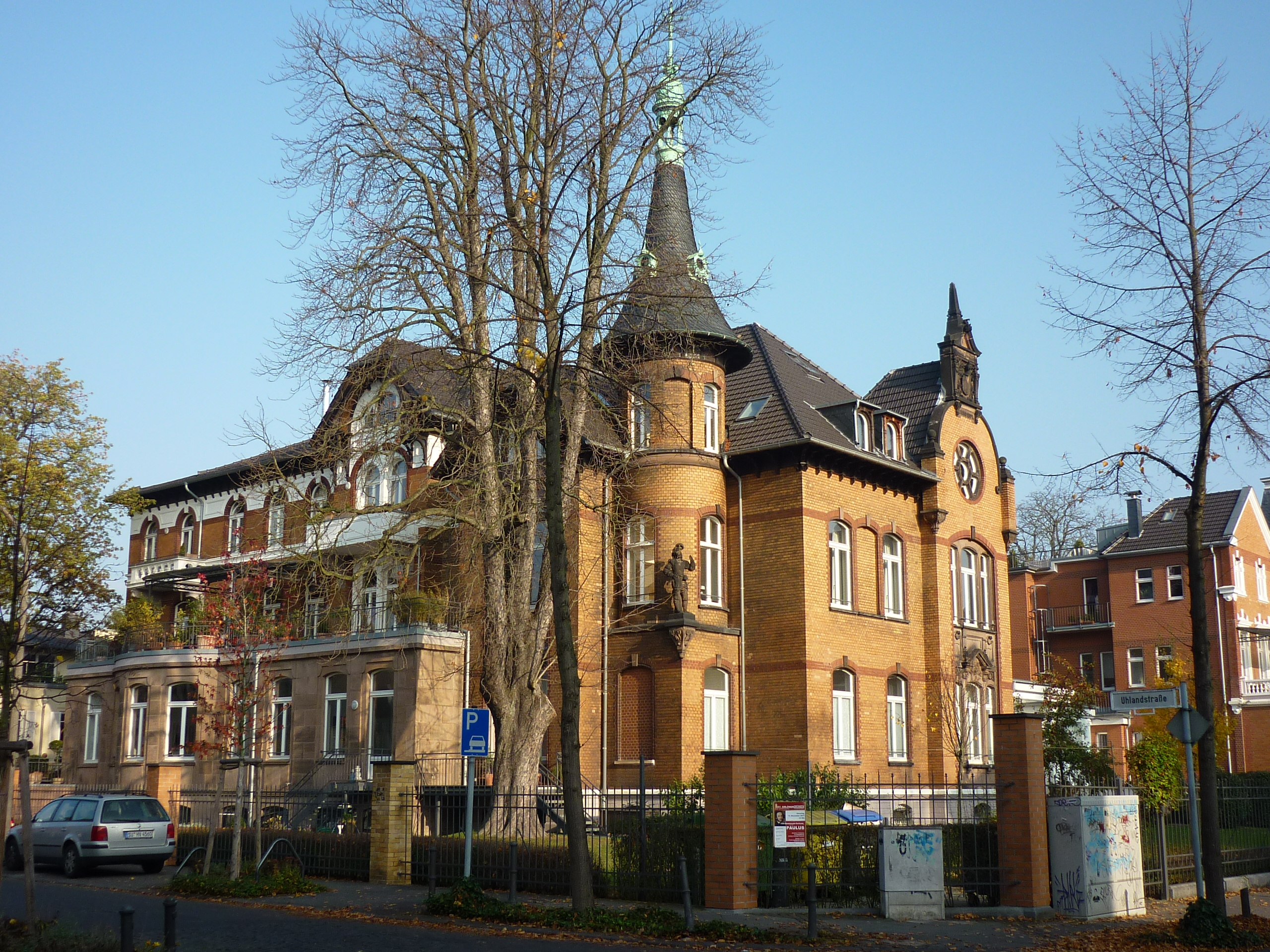 Haus an der Rheinallee, Villenviertel, 11.2011